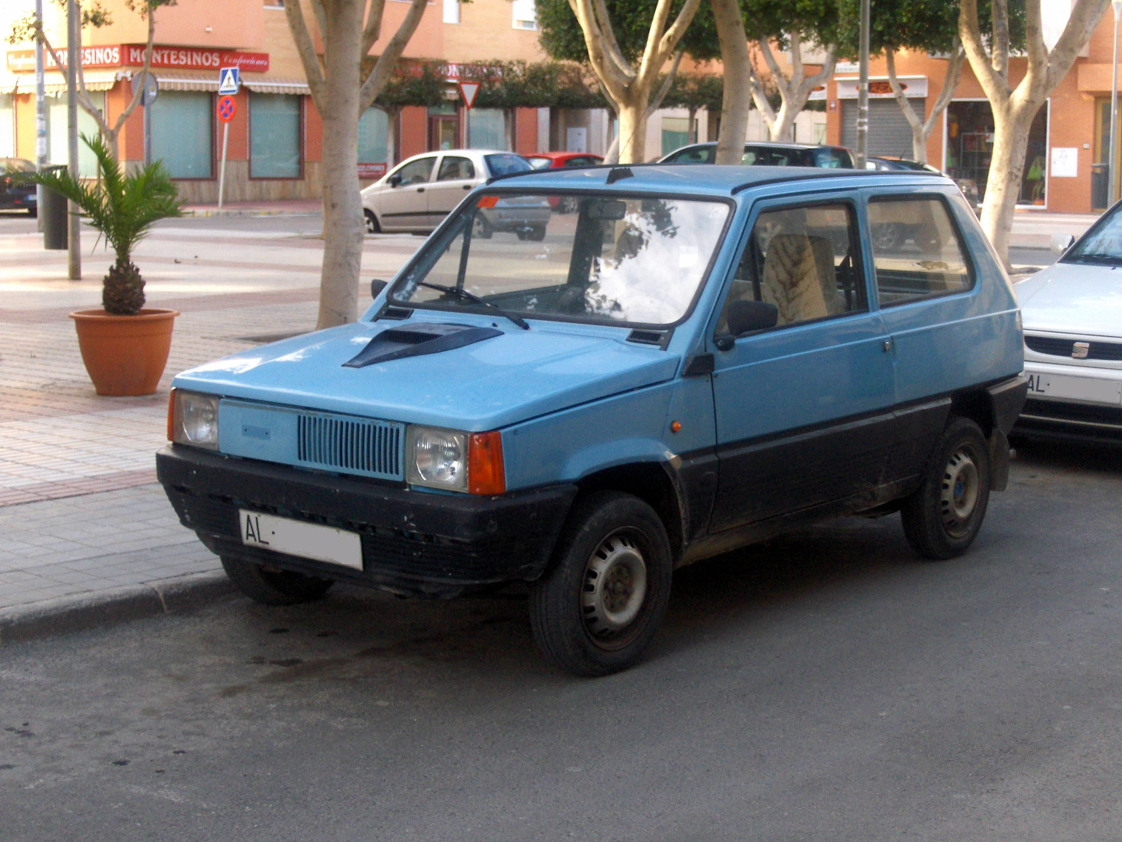 Seat Panda azul, en la vía pública